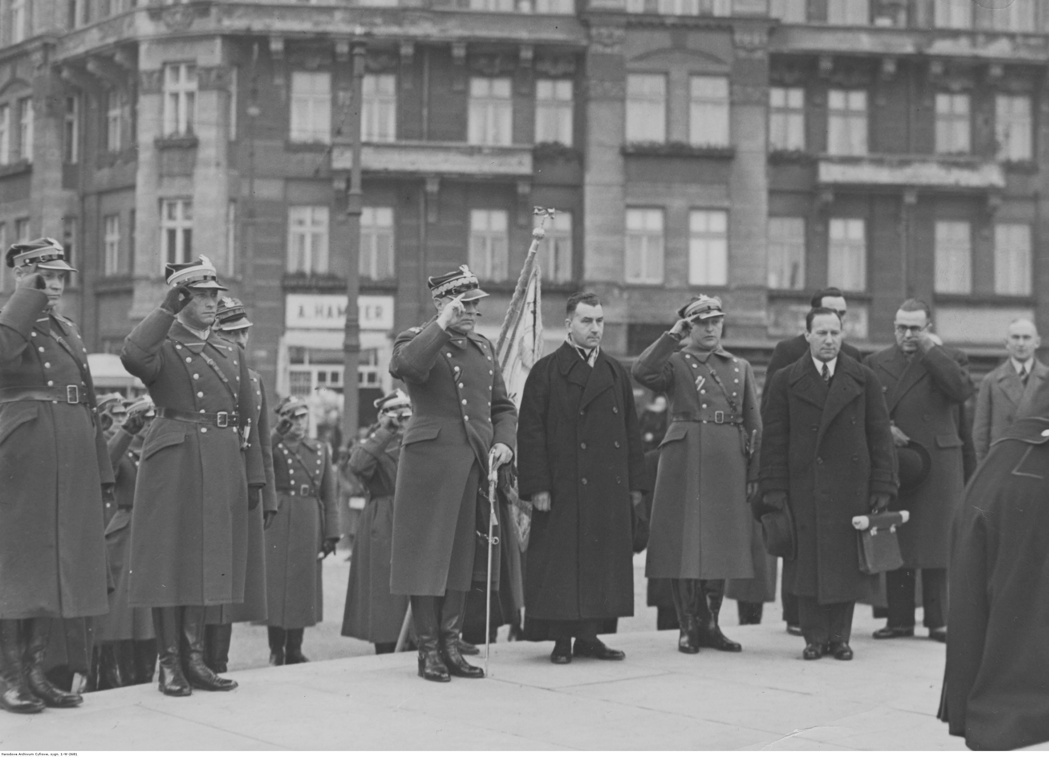 Złożenie wieńca przez Zarząd Główny Ligi Obrony Powietrznej i Przeciwgazowej pod pomnikiem poległych lotników w Warszawie. Władze LOPP salutują w momencie składania wieńca na pl. Unii Lubelskiej w Dzień Zaduszny. Widoczni m.in. gen. Leon Berbecki (3 z lewej), ks. Edmund Paszkowski (4 z lewej), mjr Adam Wojtyga (5 z lewej), mjr Józef Jungraw (2 z lewej). Koncern Ilustrowany Kurier Codzienny - Archiwum Ilustracji. Sygnatura: 1-W-2681